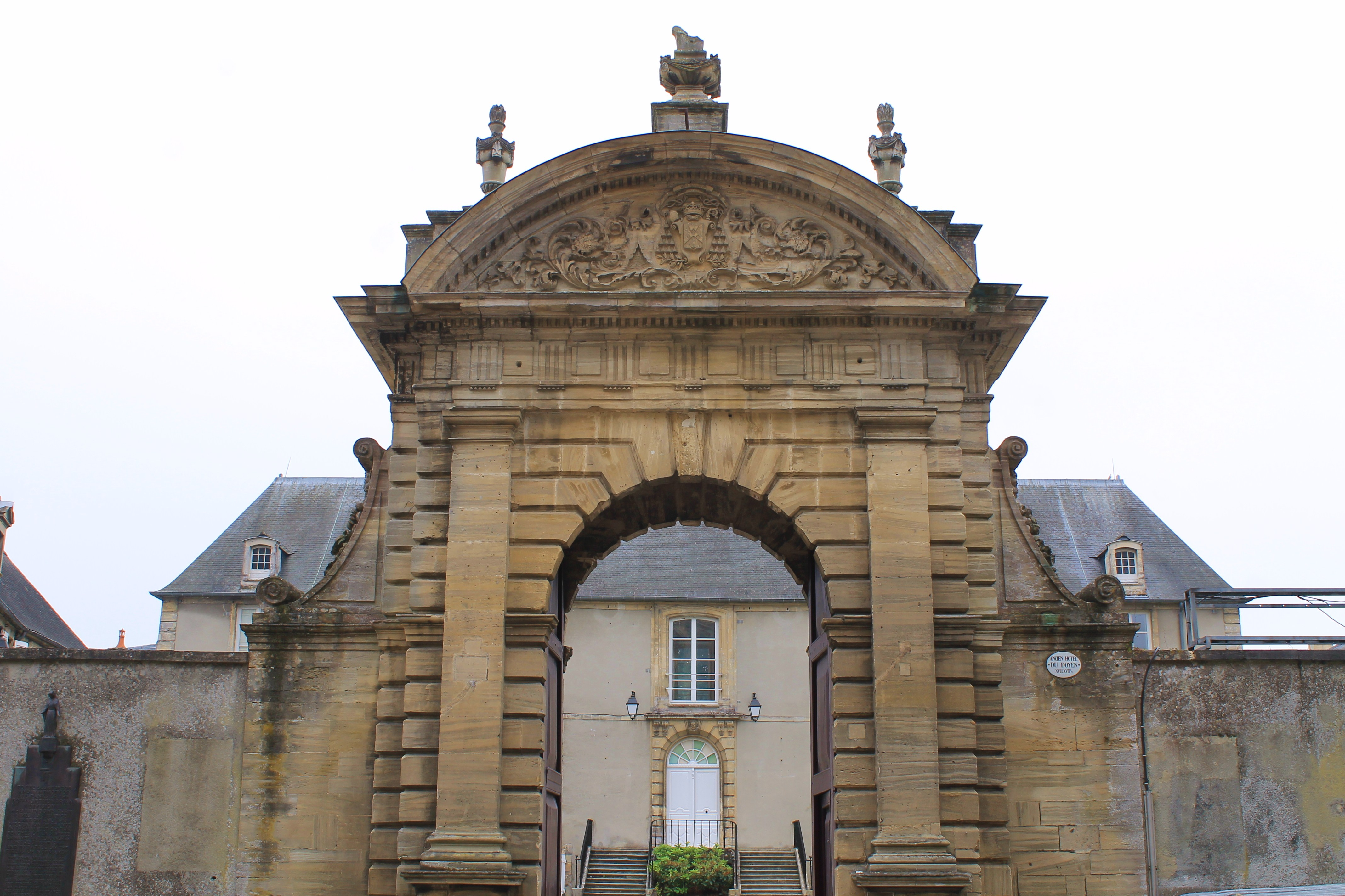 Portail de l'ancien évêché, hôtel du Doyen et bibliothèque à Bayeux (Calvados)